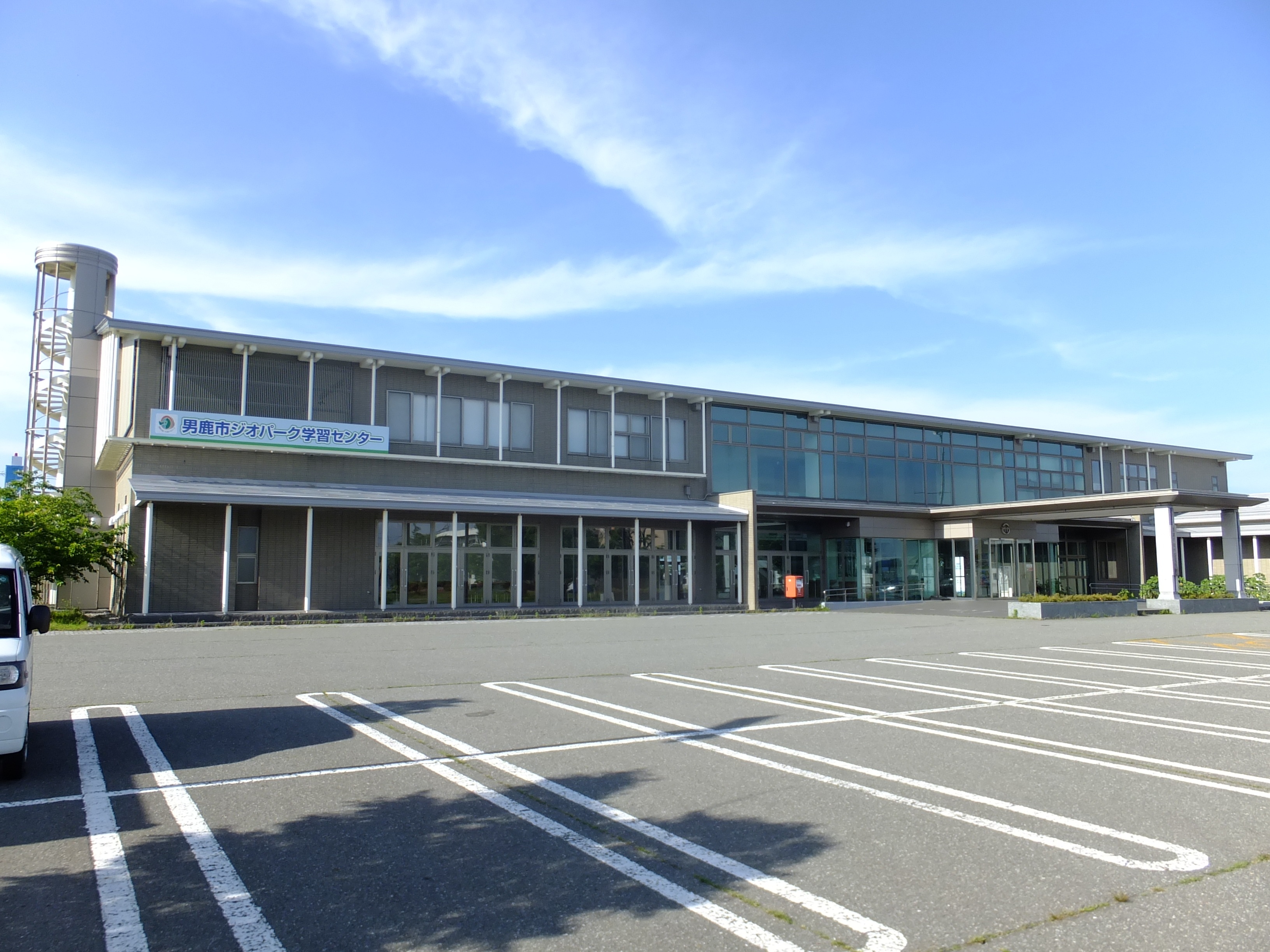 男鹿市役所若美支所（旧若美町役場庁舎）。男鹿市ジオパーク学習センターを兼ねる。